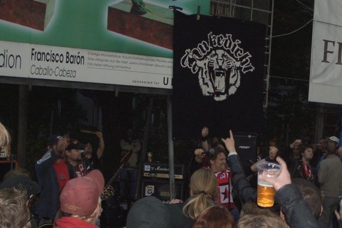 Hukedicht während des Halbzeitkonzerts in der Bierkurve im Stadion Schützenwiese des FC Winterthur. Es war ihr zweitletzter (Abschieds-)auftritt.